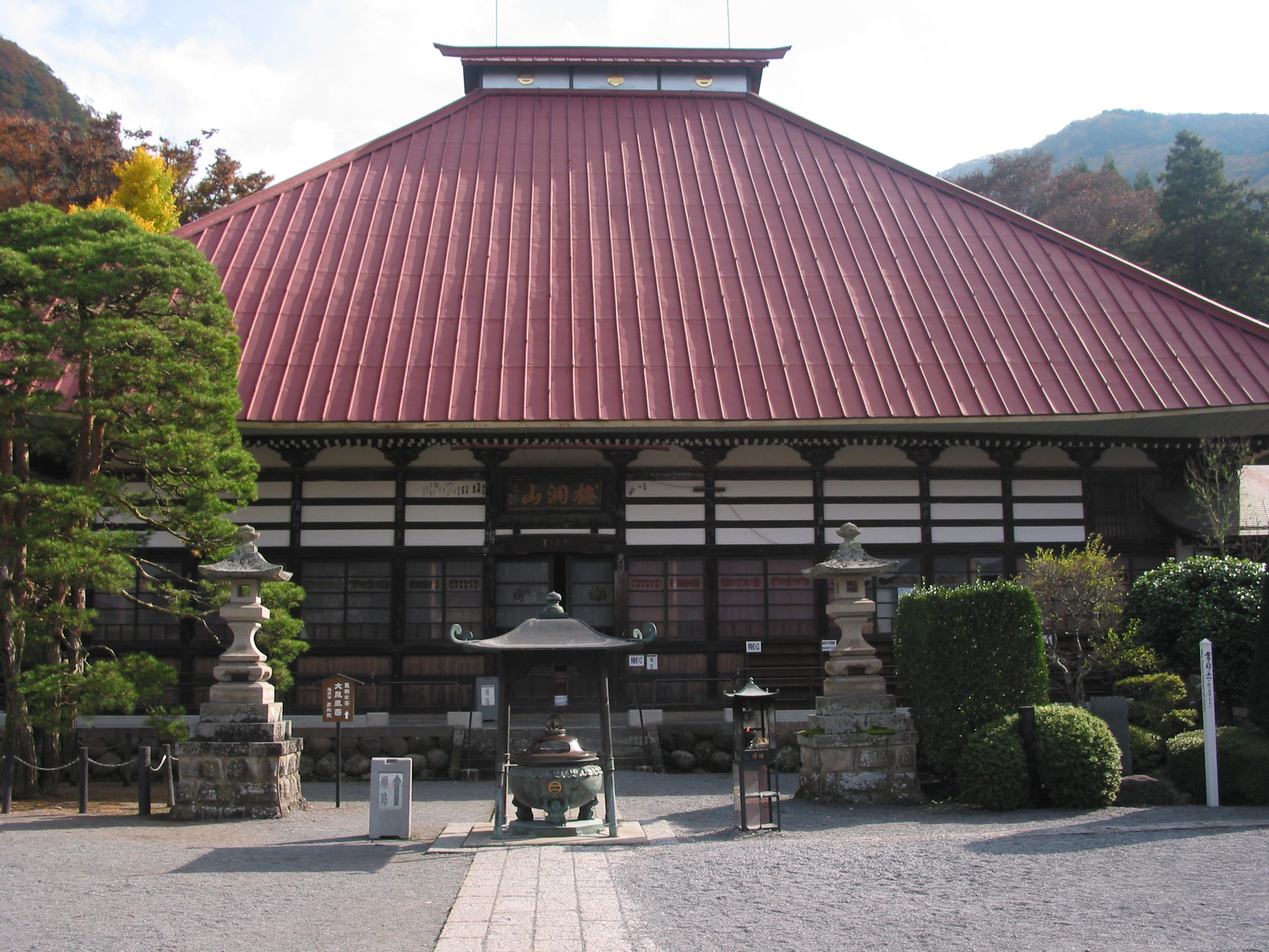 Hondō of Ganshōin 長野県上高井郡小布施町にある曹洞宗梅洞山岩松院の本堂。